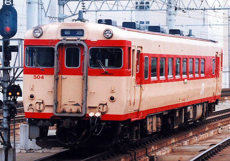 JR北海道 キハ53 504